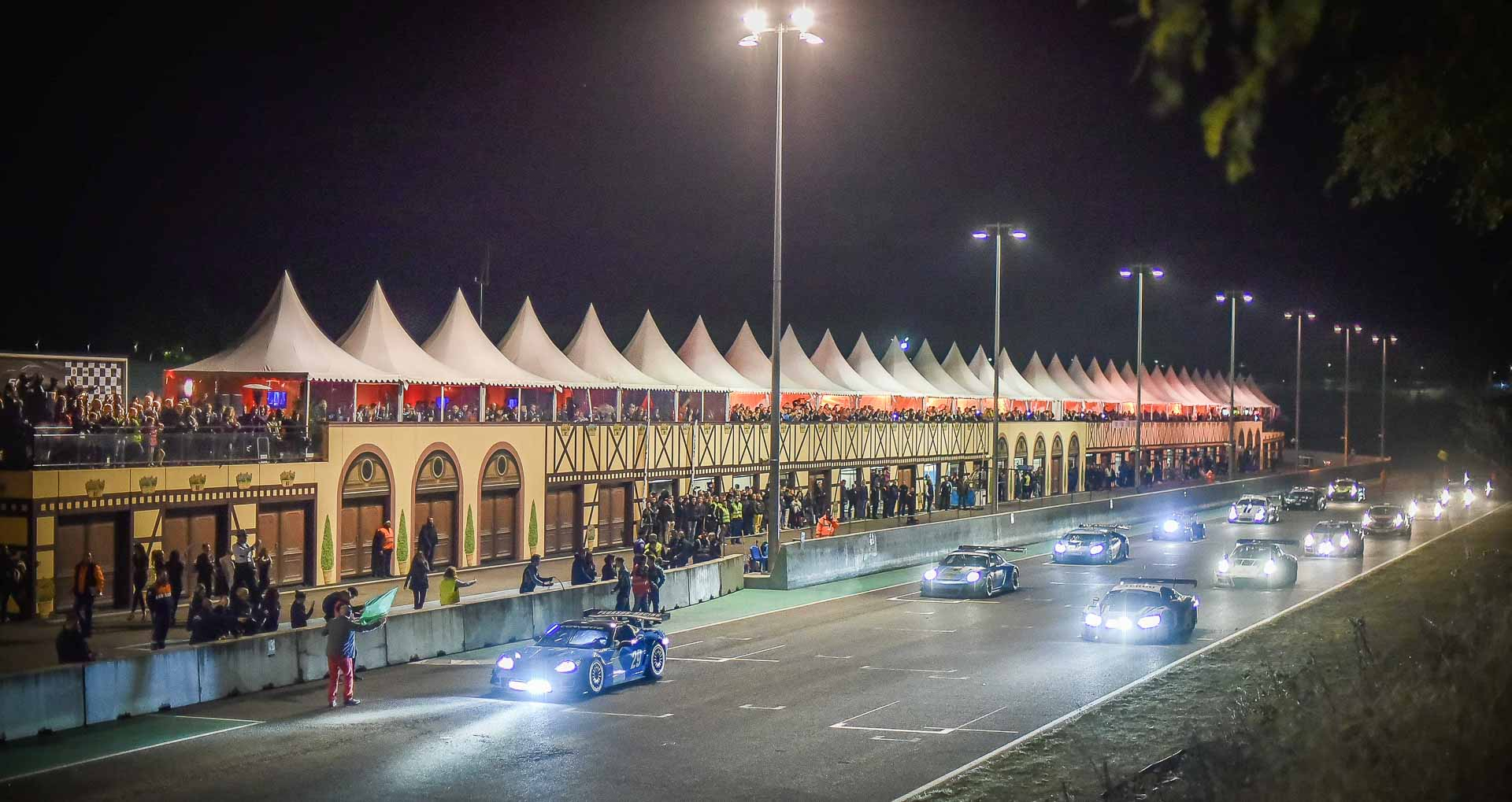 Grille de départ 2016